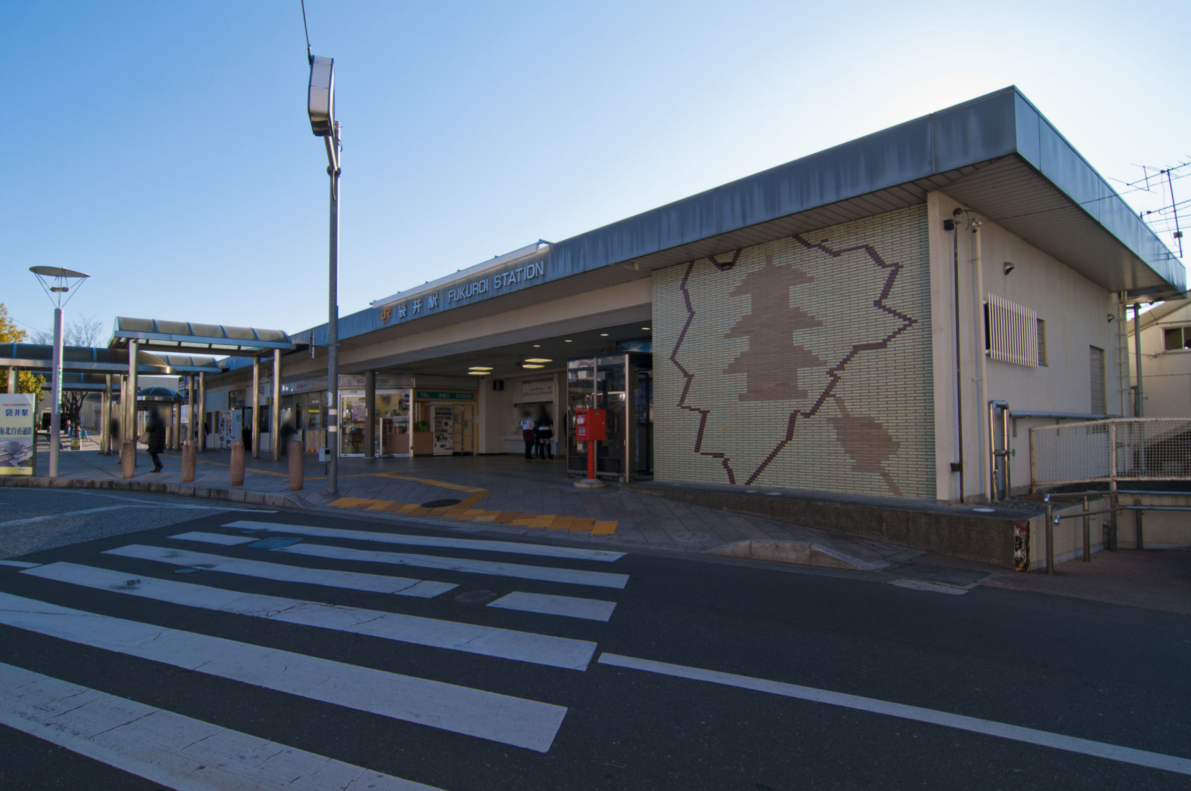 東海旅客鉄道株式会社東海道本線袋井駅駅舎